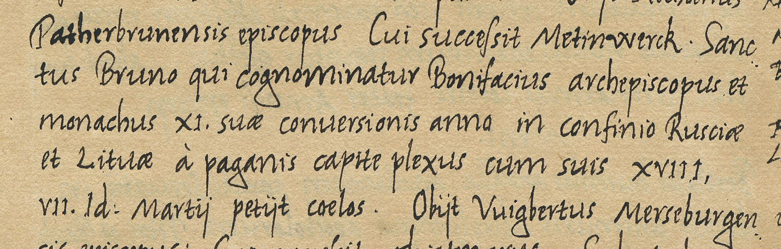 Ausschnitt aus Blatt 31v der Quedlinburger Annalen mit Erwähnung des Märtyrertodes Brun von Querfurts 1009 im Grenzgebiet Russlands und Litauens